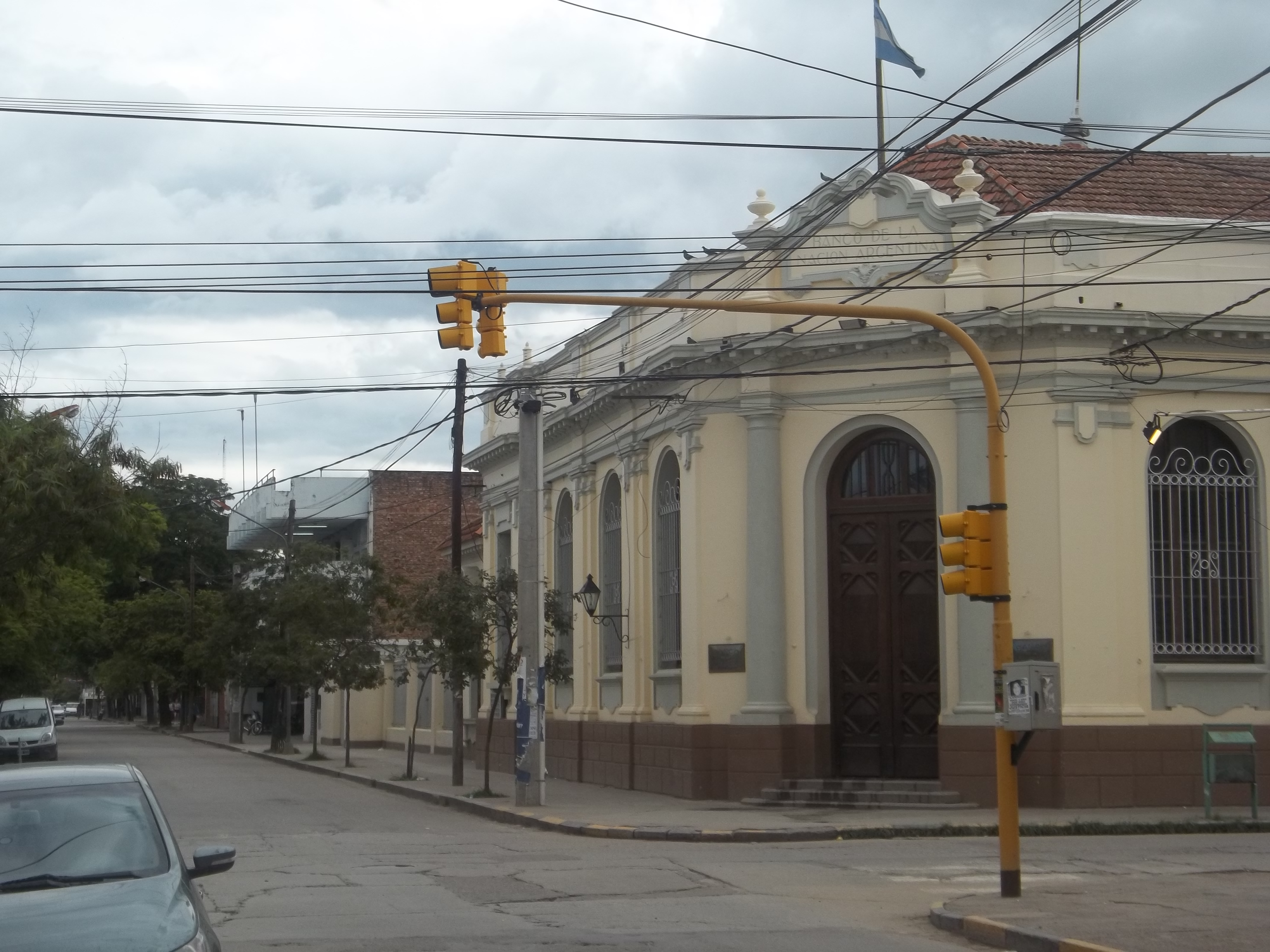 Sucursal del Banco de la Nación Argentina en San Ramón de la Nueva Orán (Pellegrini y Egüés).